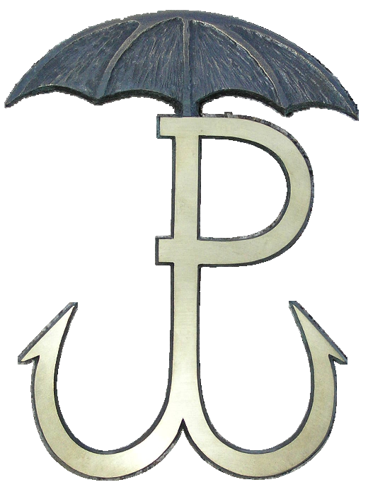 Pomnik przy Wolskiej, Pałacyk Michla, emblemat Batalionu Parasol